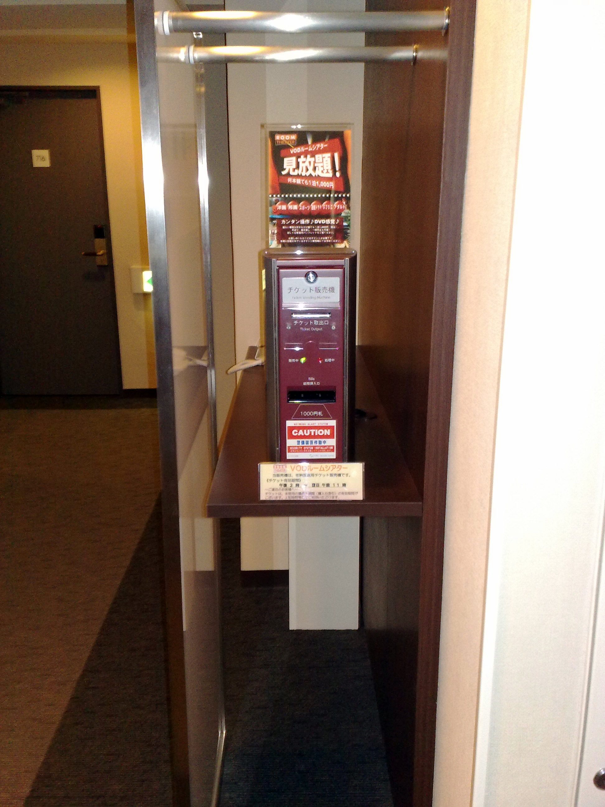 こういうマシーンがあるのは日本のビジネスホテルの常。